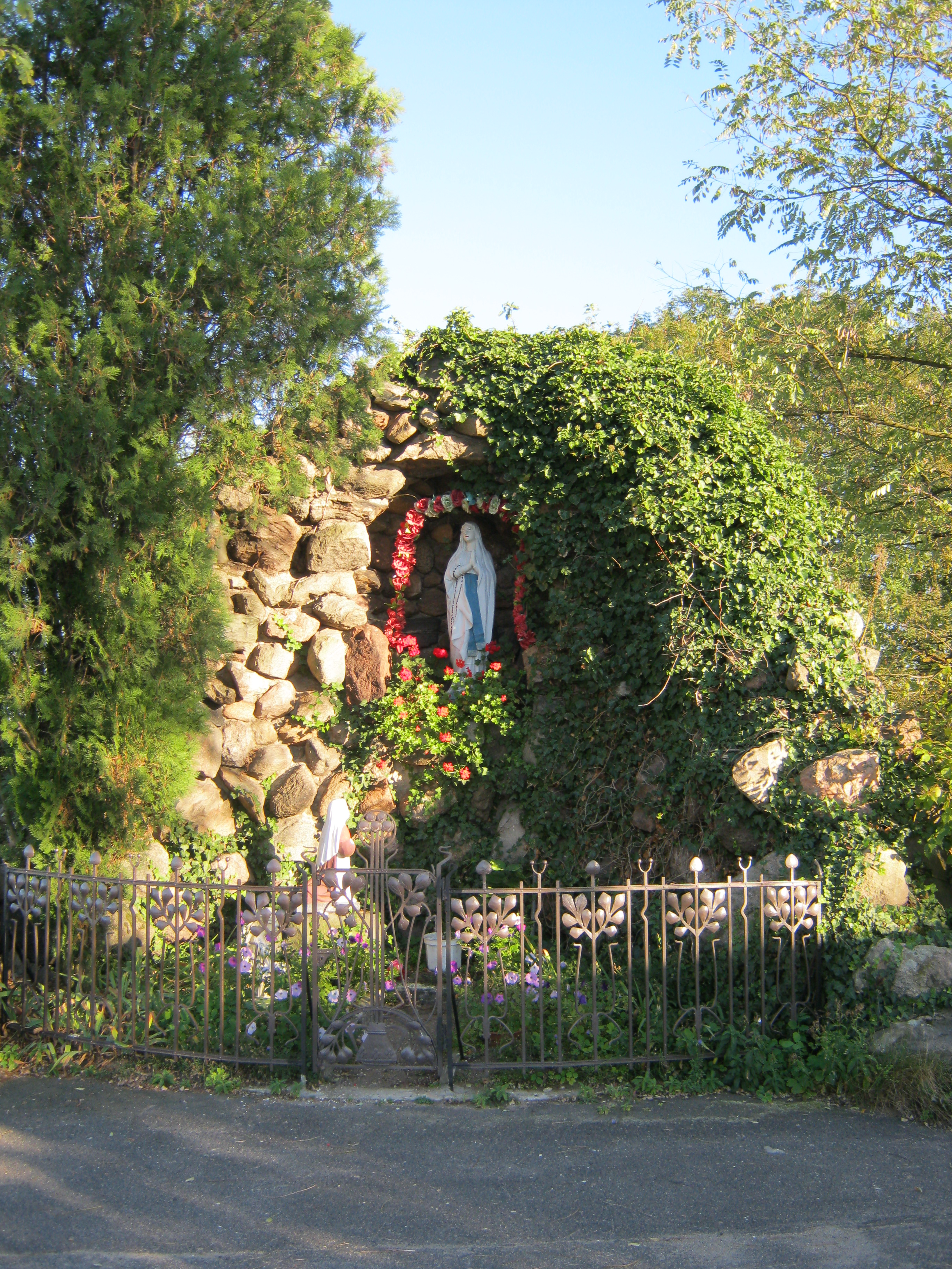 Grota NMP z Lourdes w Kamionce od zachodniej strony.